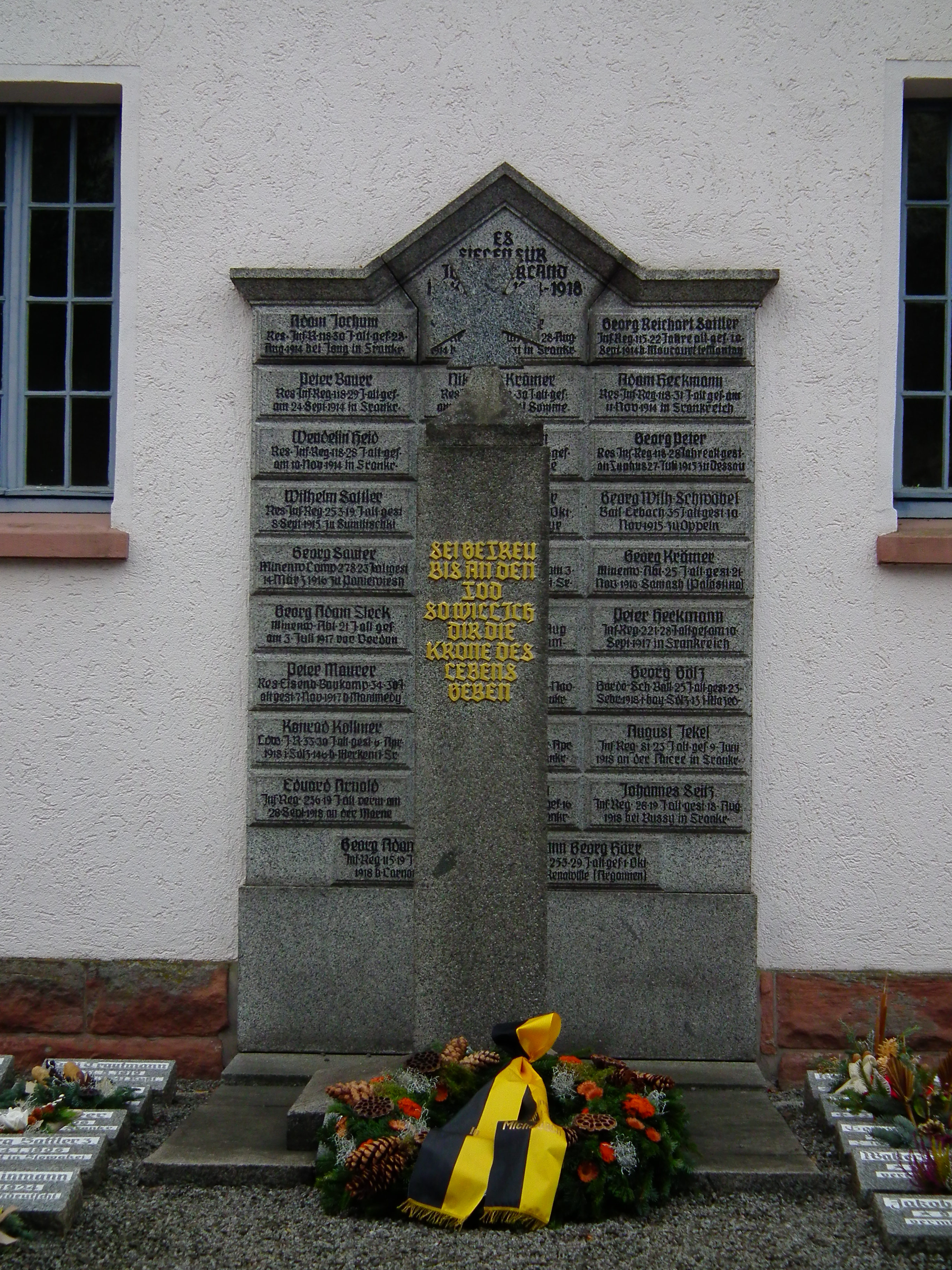 Kriegerdenkmal vor der Gustav-Adolf-Kirche in Affolterbach, einem Ortsteil von Wald-Michelbach (Kreis Bergstraße, Hessen, Deutschland)